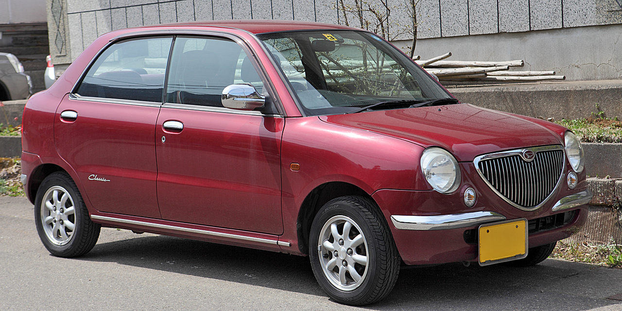 Daihatsu Opti Classic (GH-L800S, '00 03 - '01 10)